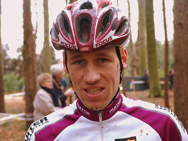 Maarten Nijland, renner van ruiters-dakkappelen